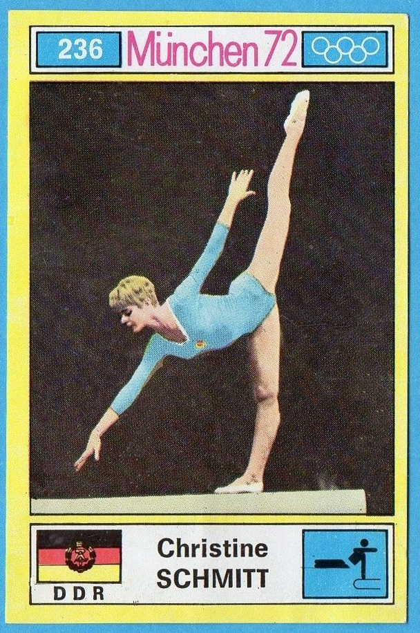 MUNCHEN/MONACO '72-PANINI-Figurina n.236- SCHMITT-DDR-GINNASTICA